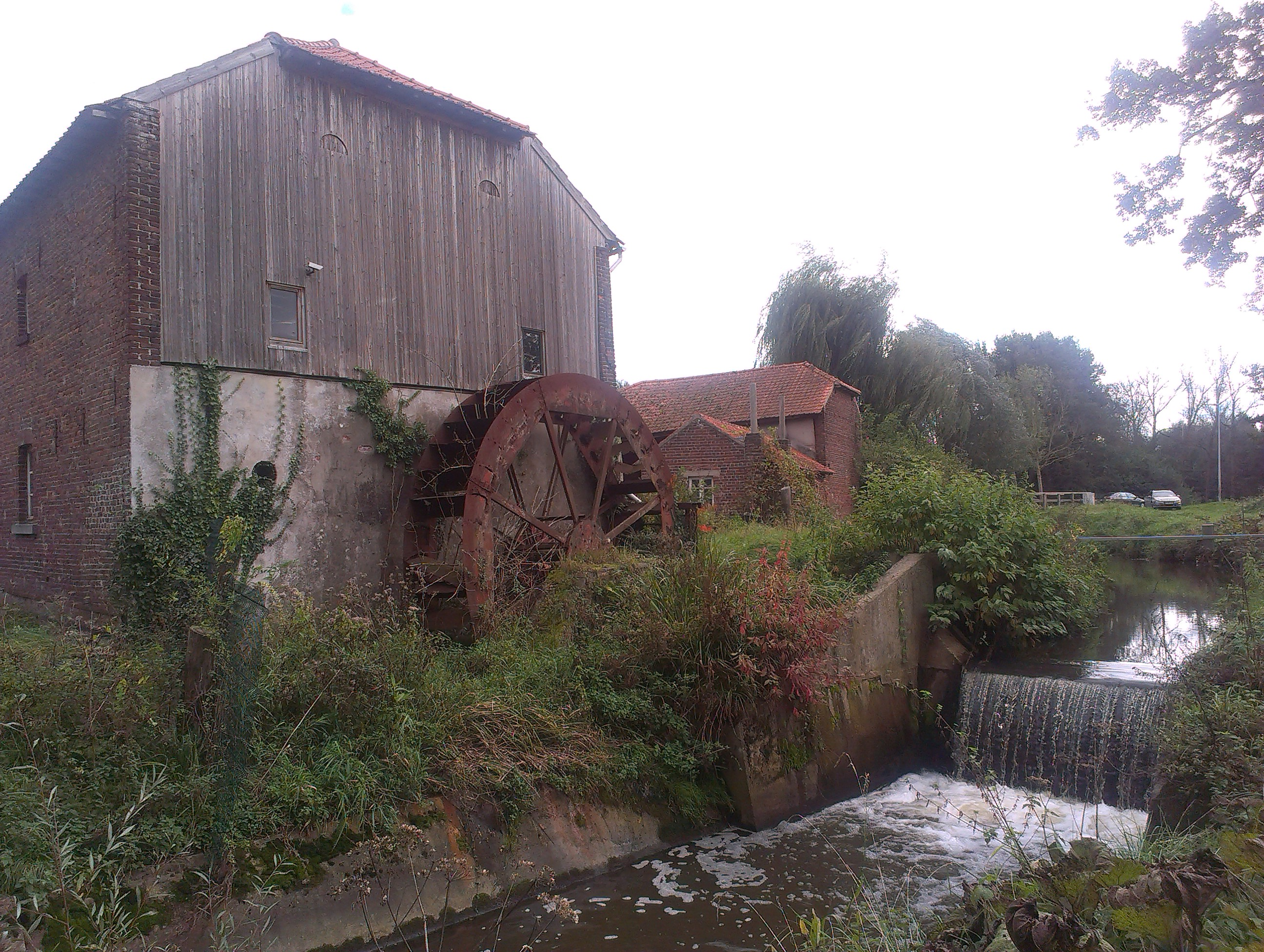 Rentfortmolen in Bilzen (oktober 2014)